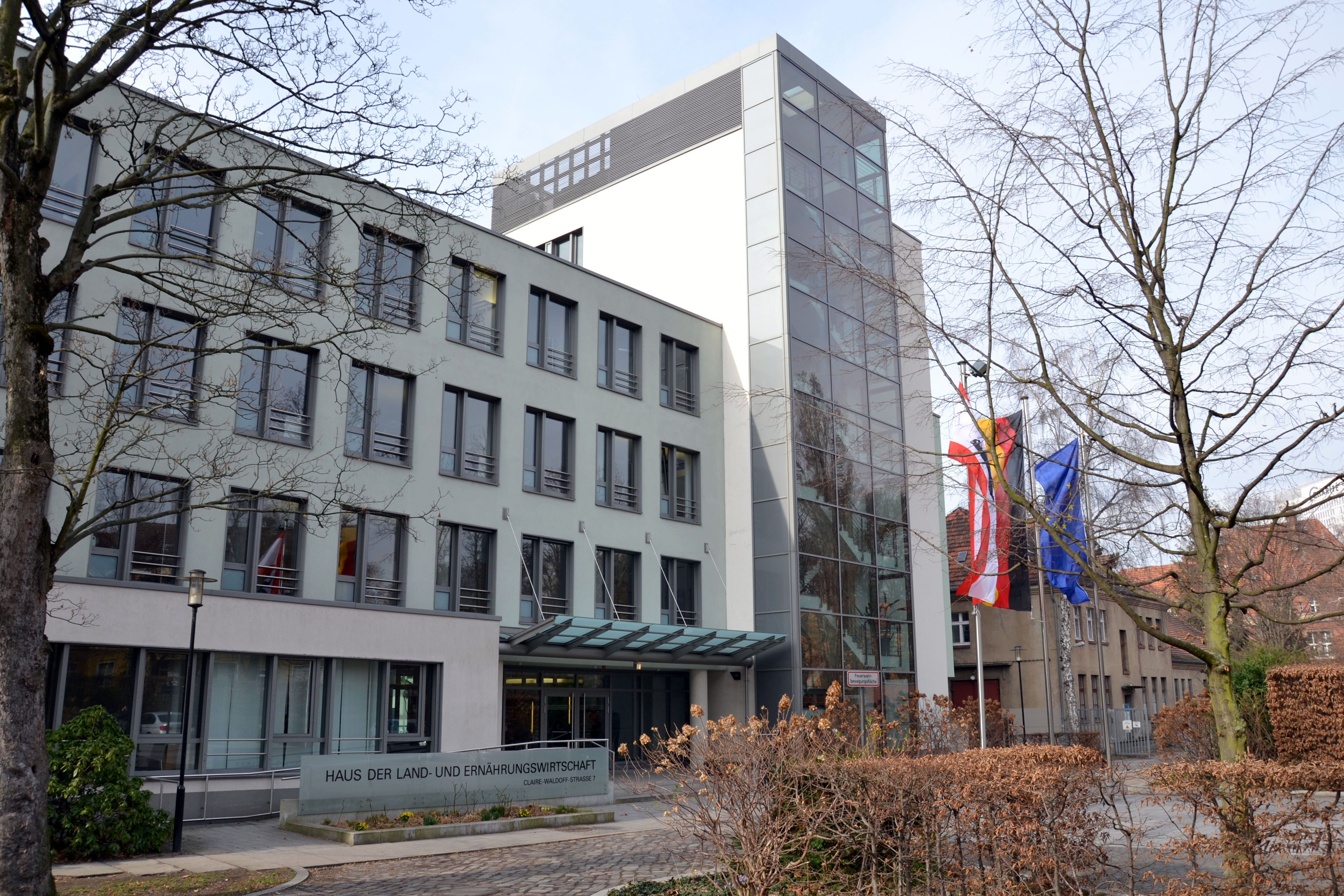 Haus der Land und Ernährungswirtschaft